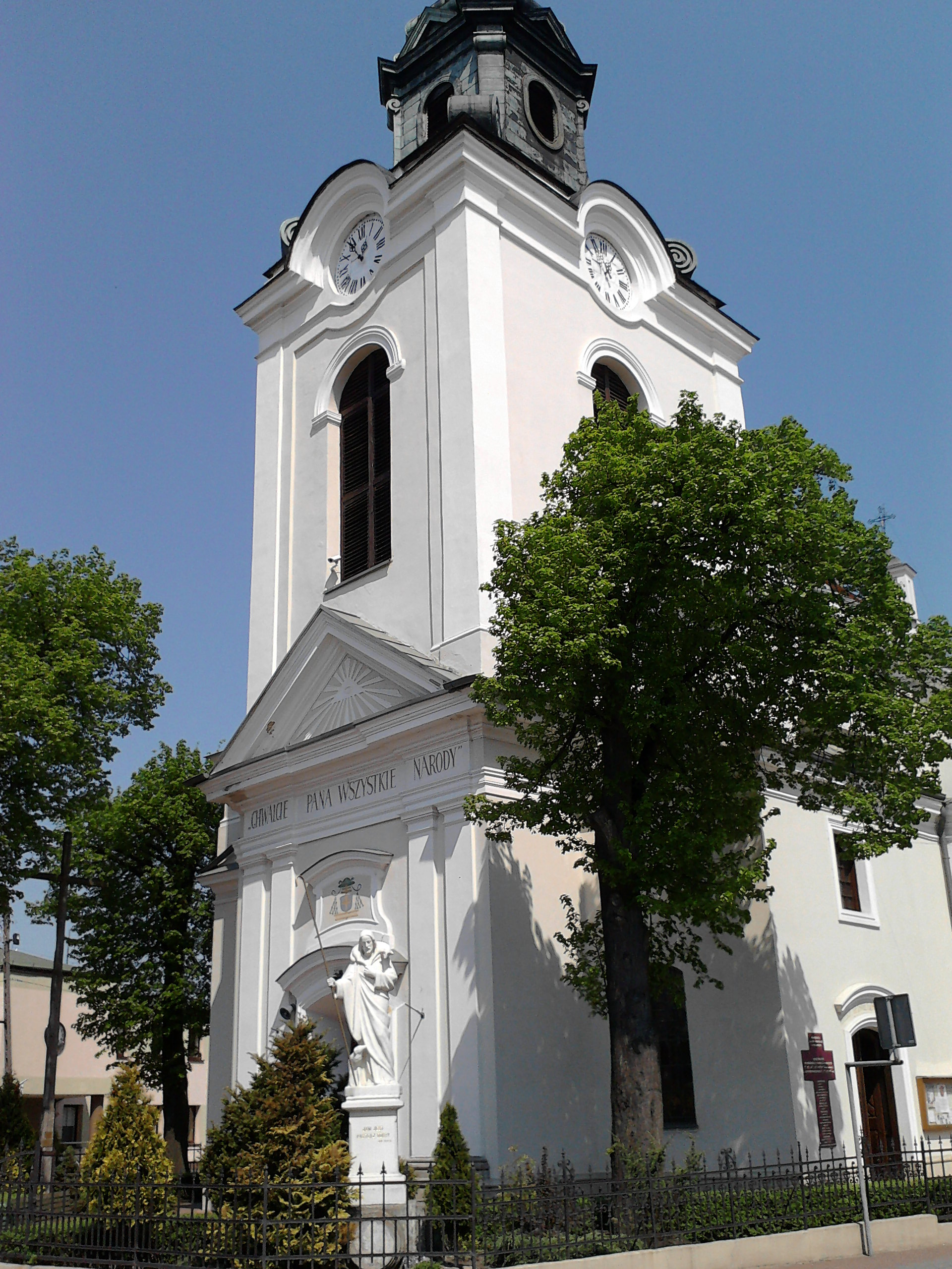 Wieża kolegiaty w Wolborzu